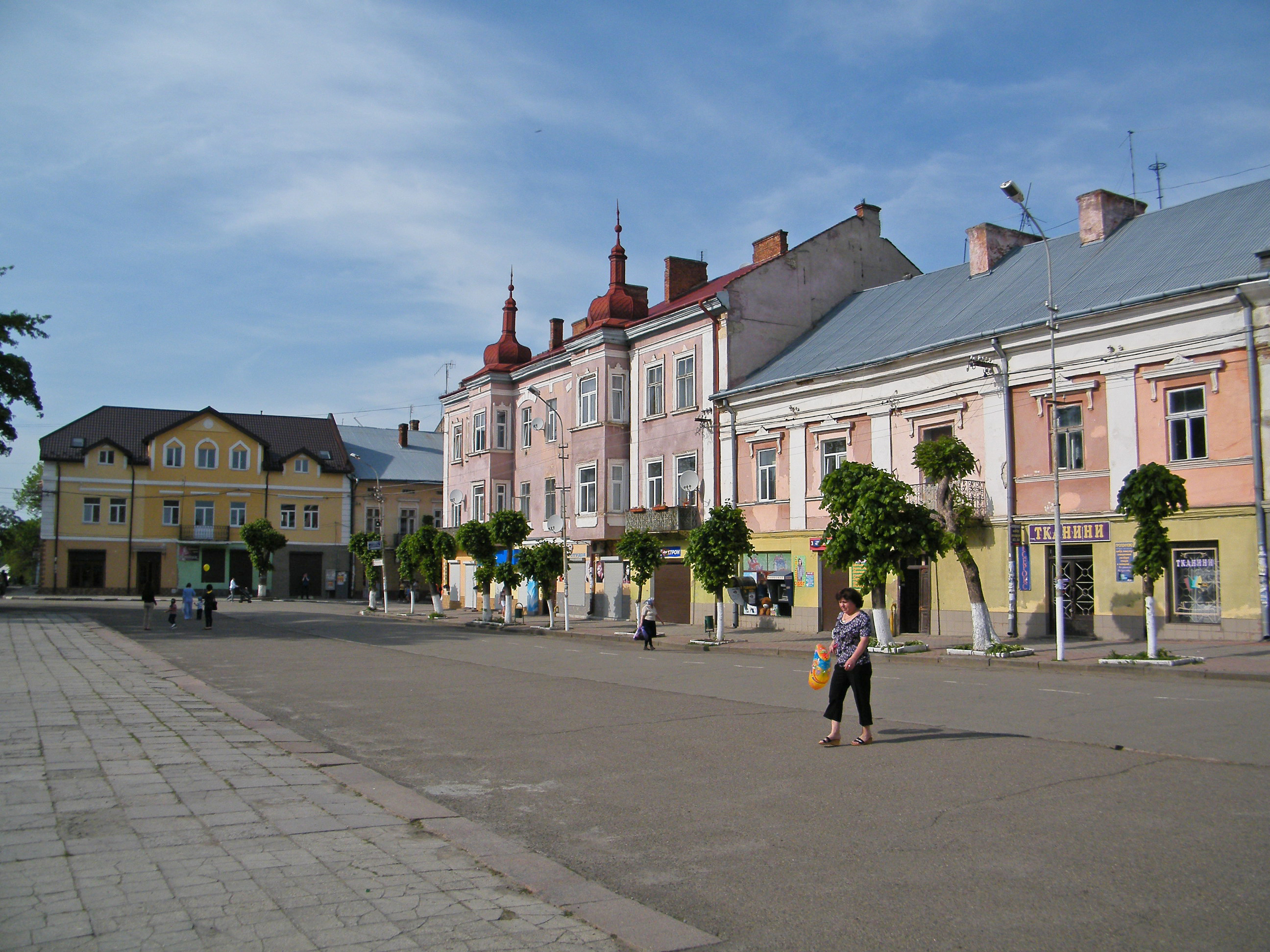 Площадь Рынок